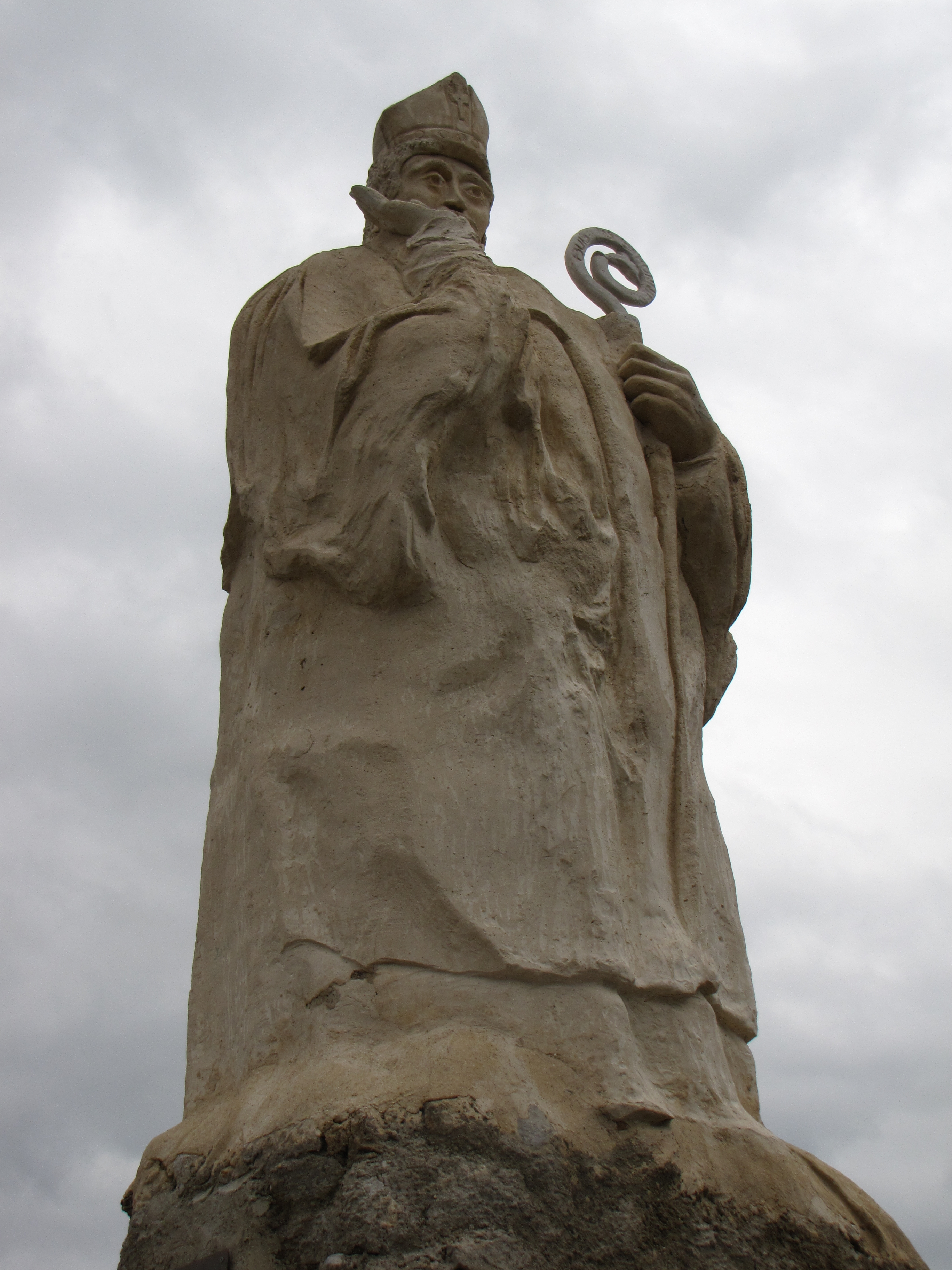 Statue de saint Trophime au-dessus de la chapelle Saint-Trophime, dans la commune de Buis-les-Baronnies (Drôme, France).